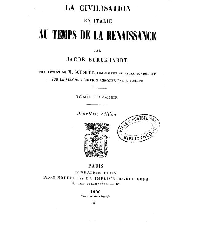 photographie d'une édition de 1906, libre de droits ; source : Gallica.